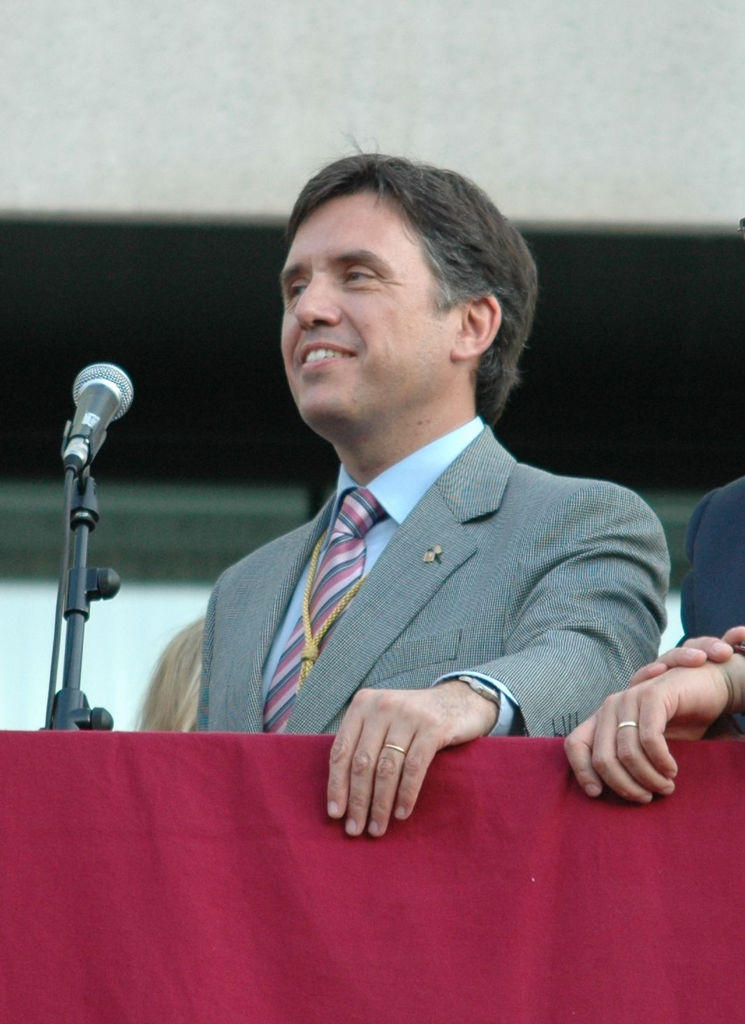 Lluís Recoder al pregó de la Festa Major de Sant Cugat del Vallès